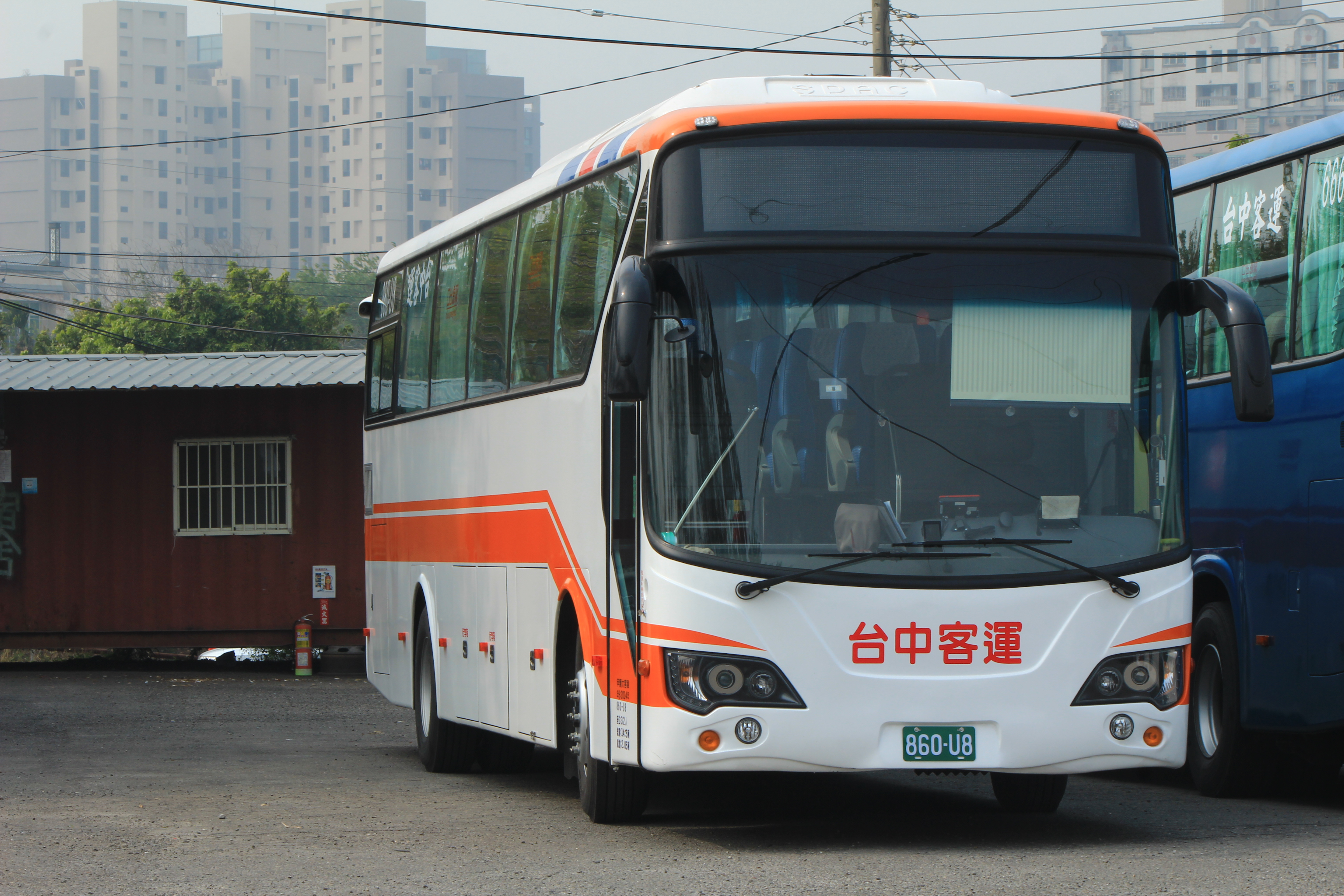 臺中客運2014年日野RN8JSVU-SSF大客車860-U8，停在臺中客運烏日停車場。